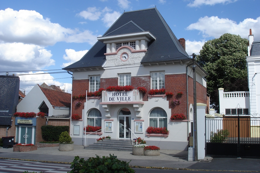 Photo prise par mes soins, il s'agit de la mairie d'Eleu-dit-Leauwette (62300, France).